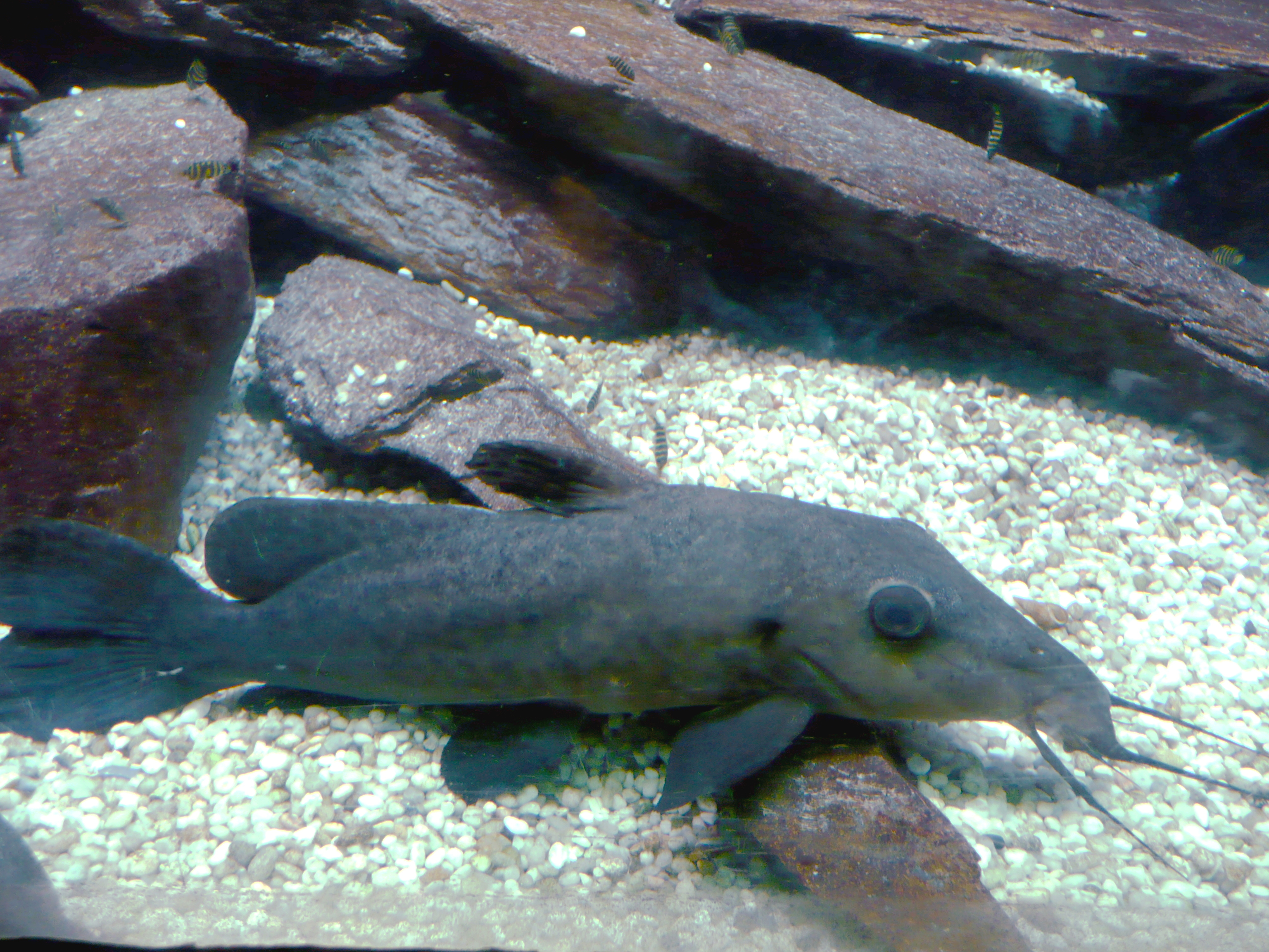 Auchenoglanis occidentalis in Aquarium tropical du Palais de la Porte Dorée